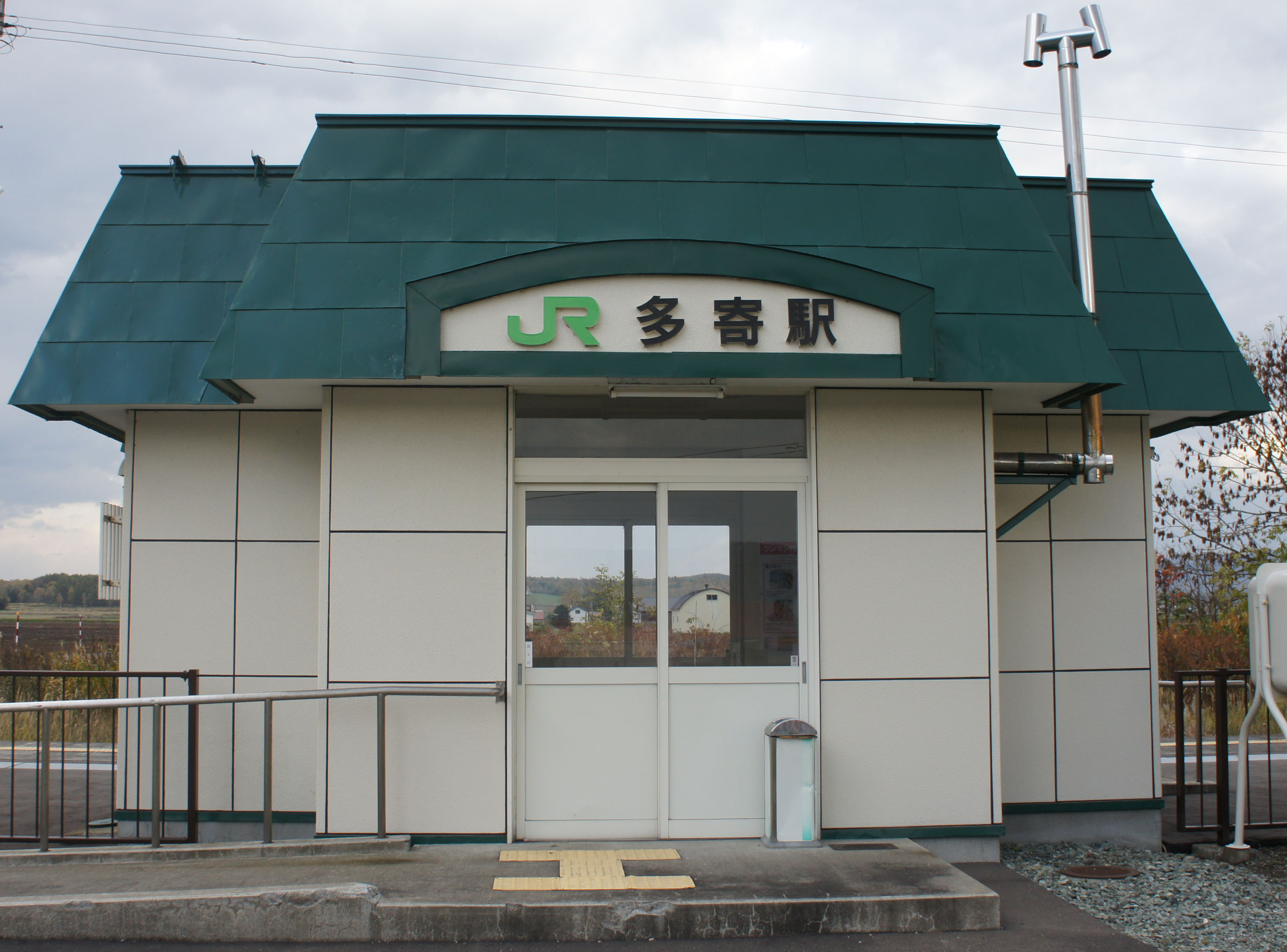 JR宗谷本線・多寄駅の駅舎 Sony NEX-3